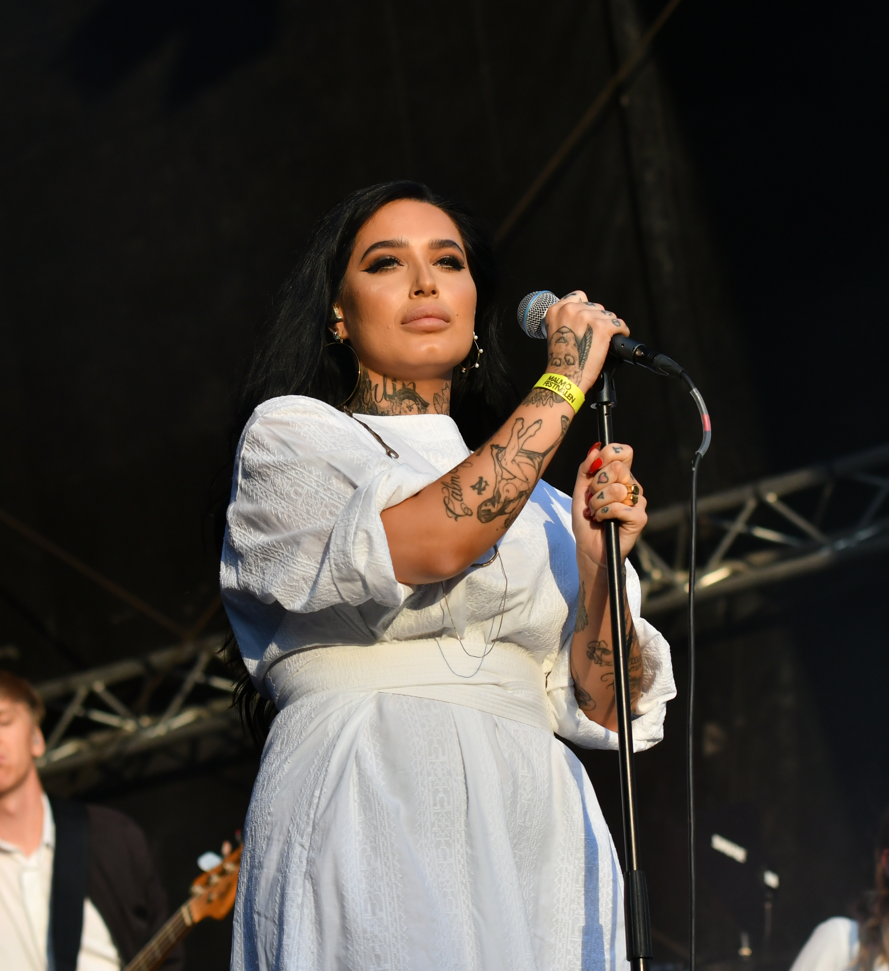 Shirin på Malmöfestivalen 2018.